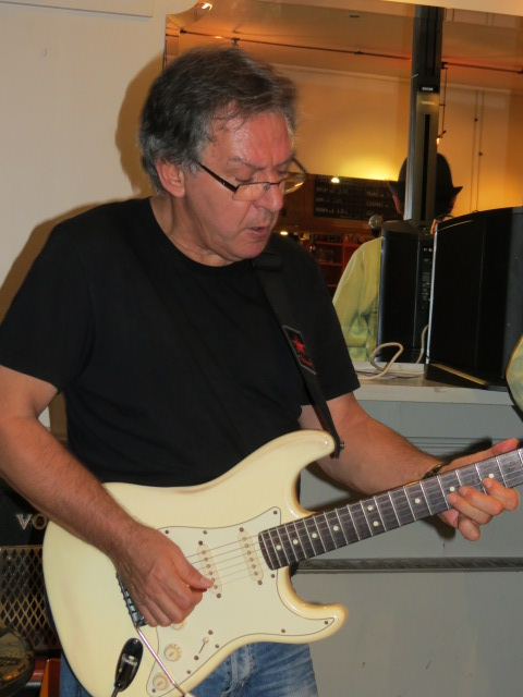 Pierre Chérèze, guitariste français